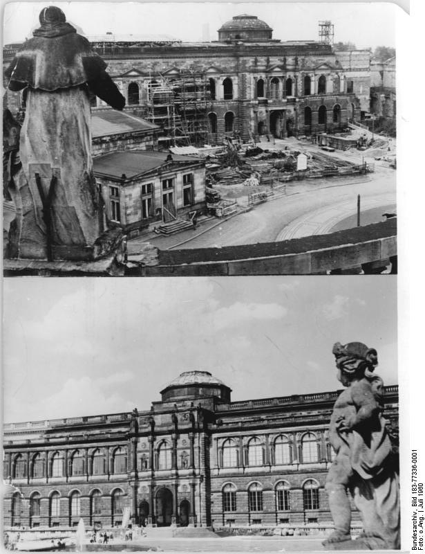 Zentralbild-Repro Fu 27.10.1960 Zur 400-Jahrfeier der Dresdner Kunstsammlungen Ubz oben: Blick vom Dach der Dresdner Hofkirche auf die Sempergalerie (Theaterplatzseite), eine Aufnahme aus dem Jahre 1955. Unten: Die wiederaufgebaute Sempergalerie (Juli 1960). Zusammensetzung: Bild 183-77336-0001 oberes Bild: Bild 183-32915-0004 unteres Bild: Bild 183-74996-0002